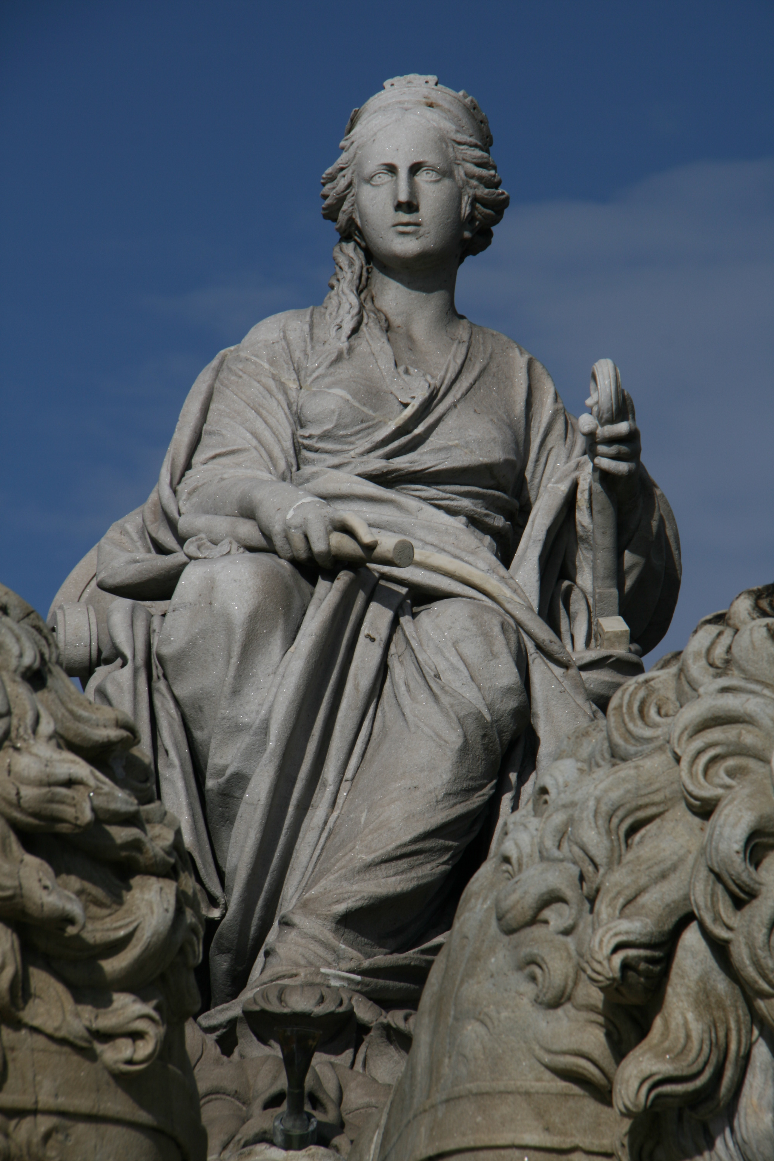 Detalle de la Cara de la Cibeles (Madrid)